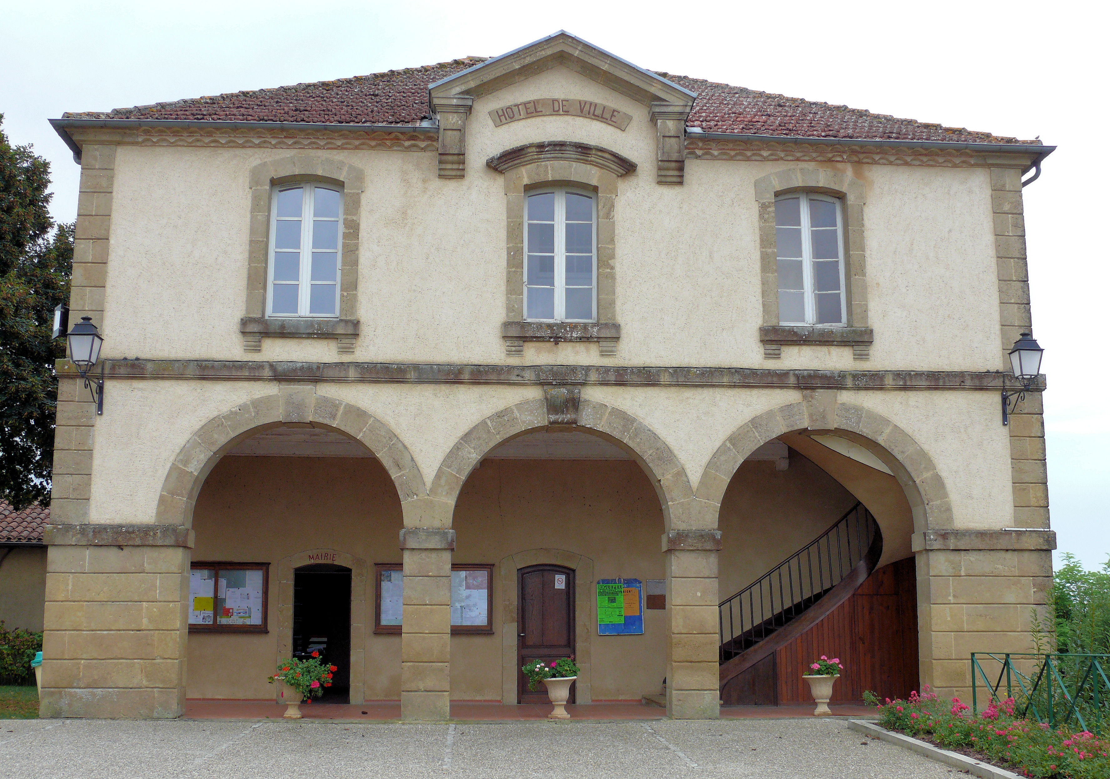 Peyrusse-Grande - Hôtel de ville